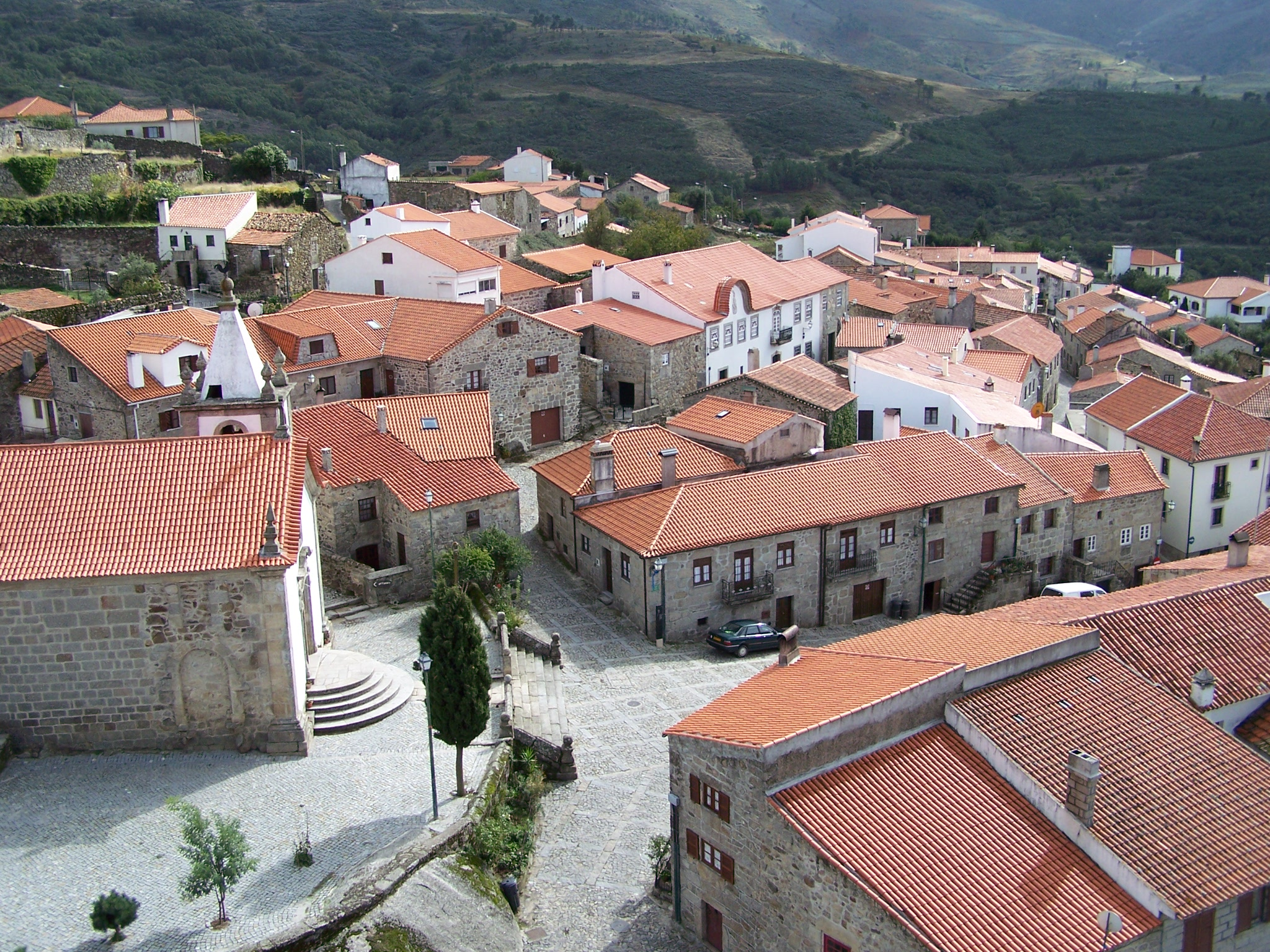 Castelo de Linhares da Beira, Portugal.